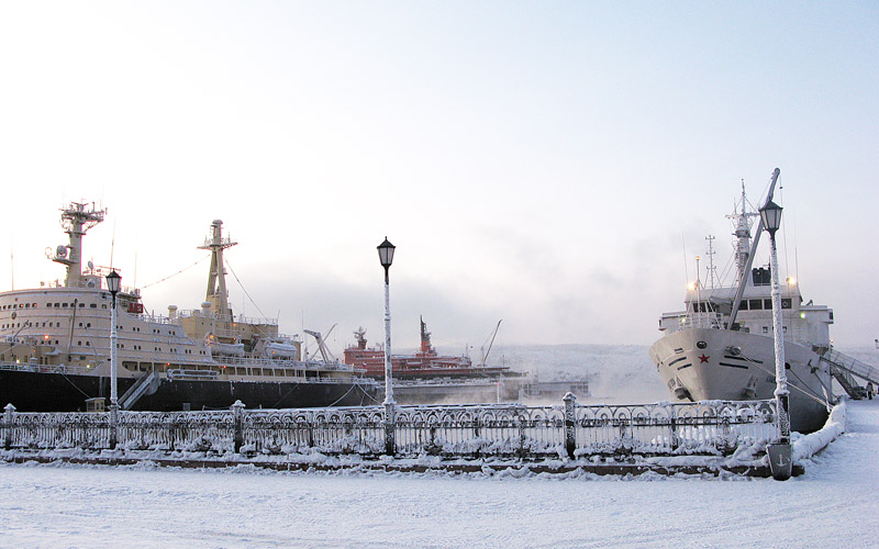 murmansk seaport